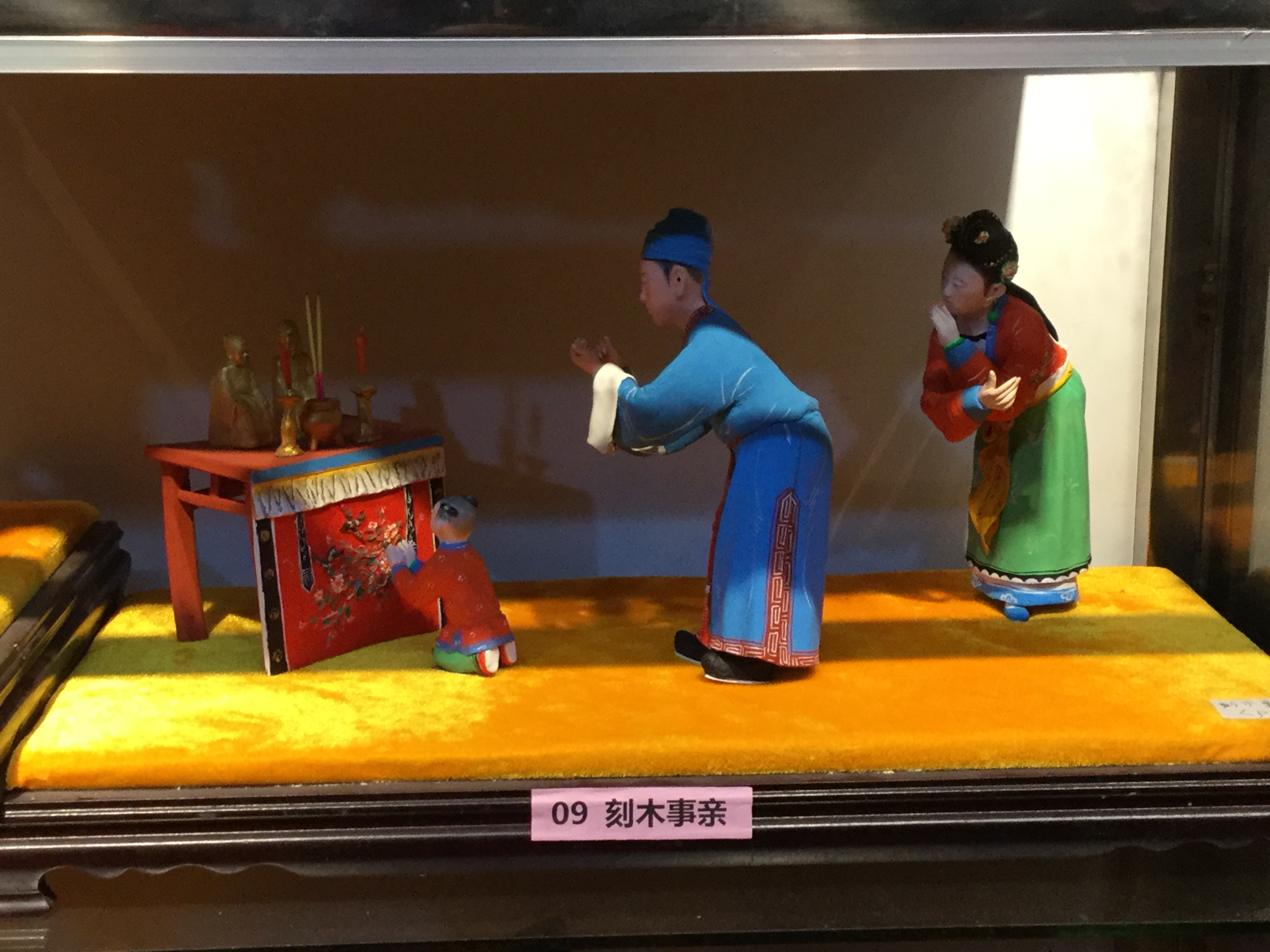 翁仔灯《刻木事亲》，摄于2018年3月2日。